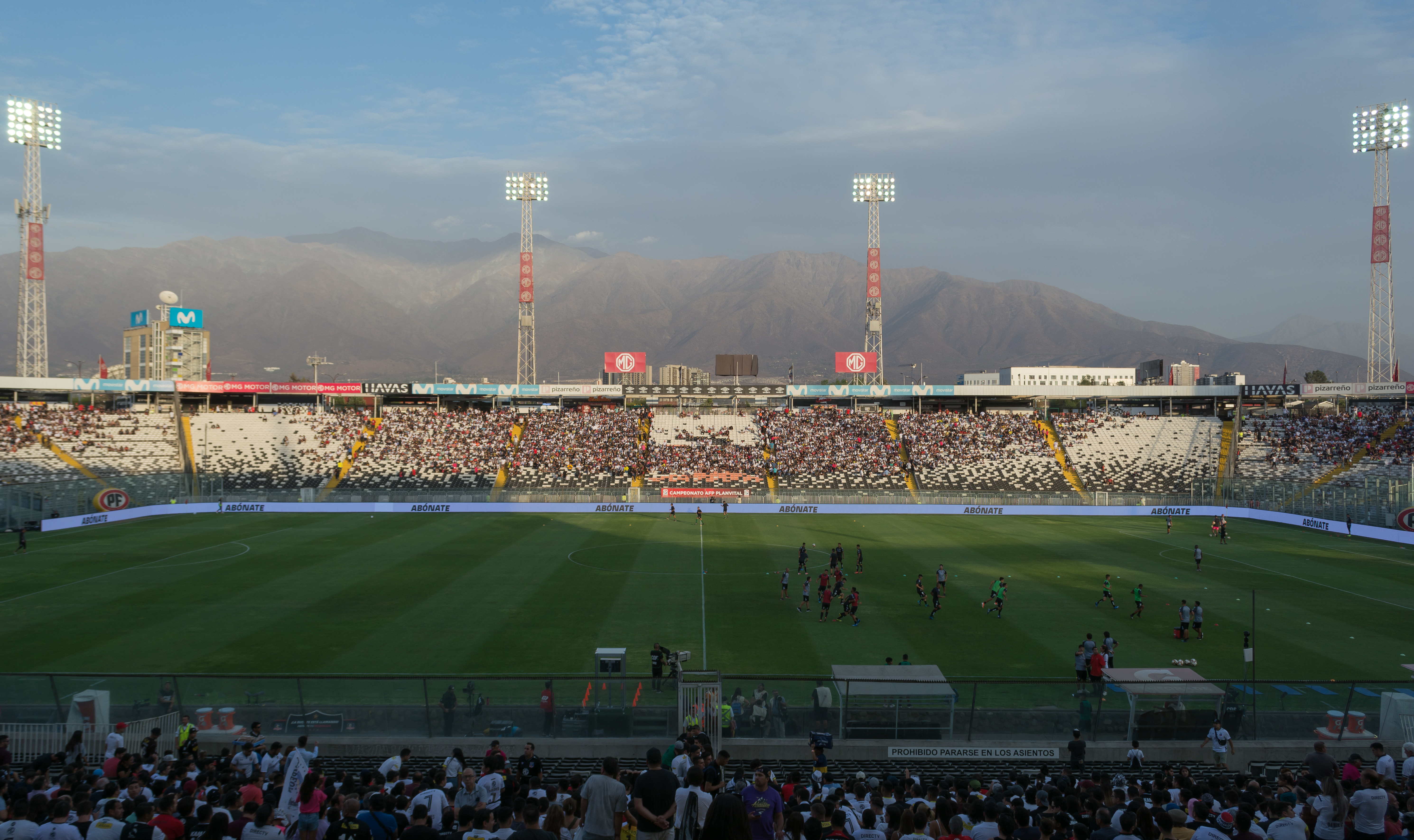 Colo-Colo v Palestino, Estadio Monumental, Macul, Santiago, Región Metropolitana, Chile